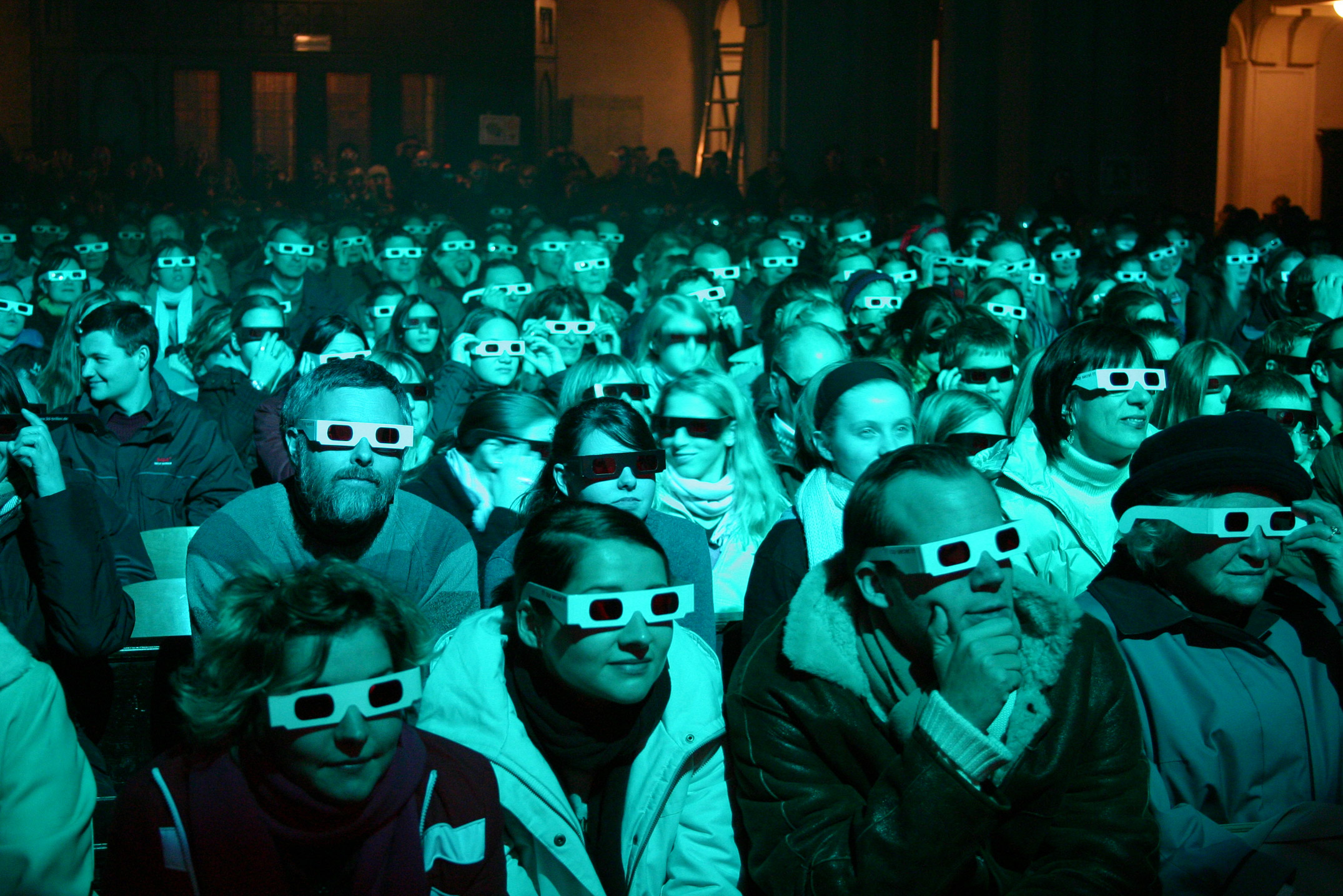 Die Jugendgottesdienste find•fight•follow setzen ungewöhnliche Methoden ein, um die christliche Botschaft zu vermitteln. 3D-Brillen rufen die Besucher dazu auf, Situationen anders zu betrachten und nach anderen Handlungsmöglichkeiten zu suchen.